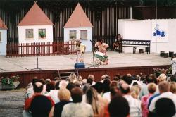 tekovske slavnosti